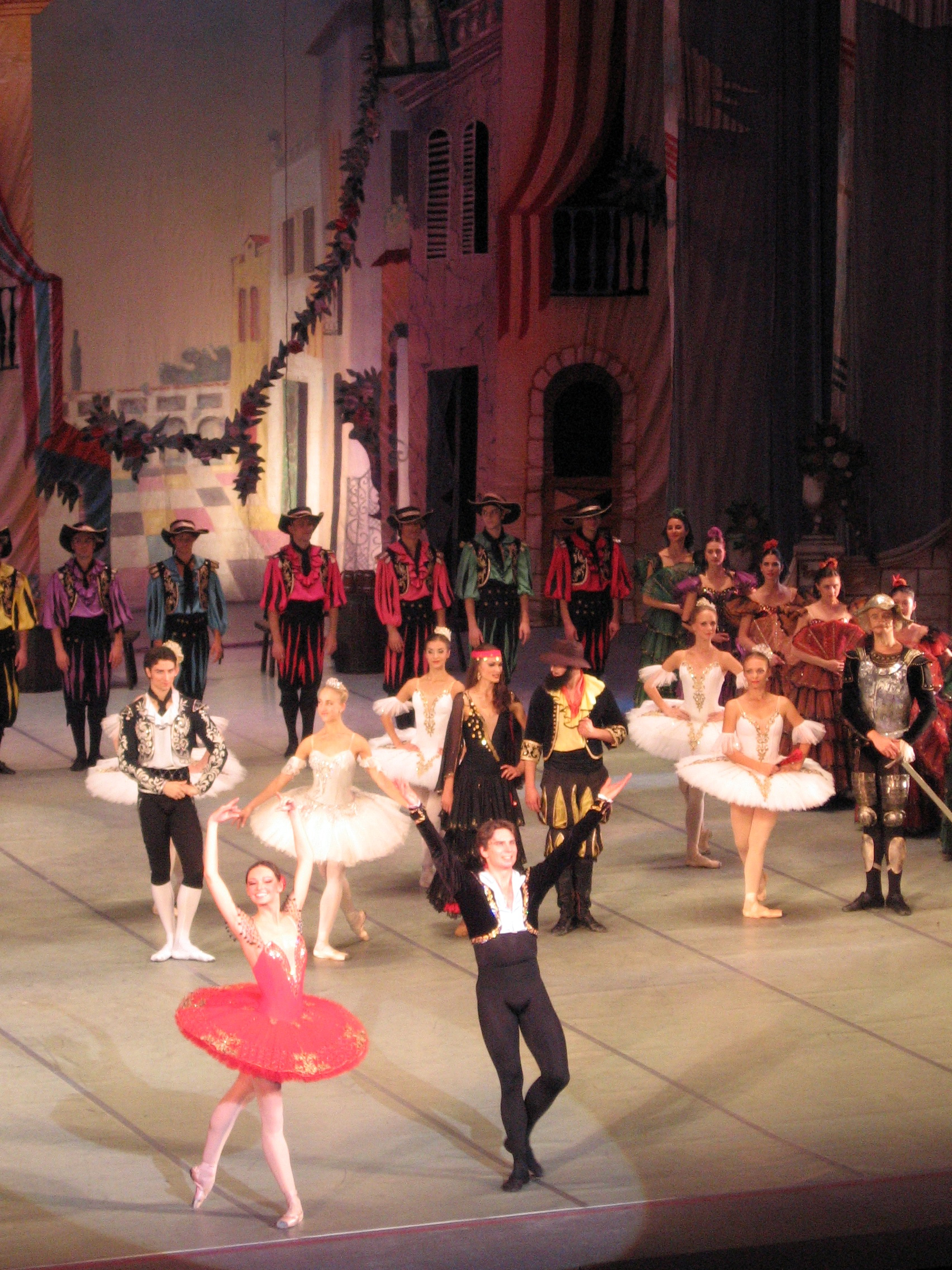 Балет Дон Кихот на сцене театра. В роли Китри - Марина Вежновец. 25.09.2011